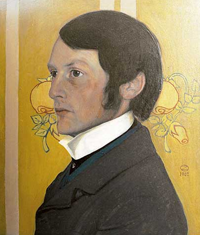 Portrait Heinrich Vogeler